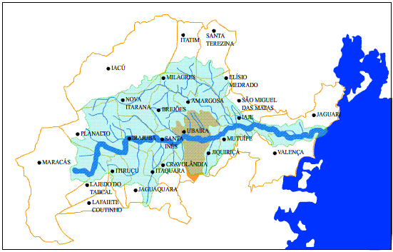 Bacía do Rio Jiquiriçá Vetorizada por Arnon Corado